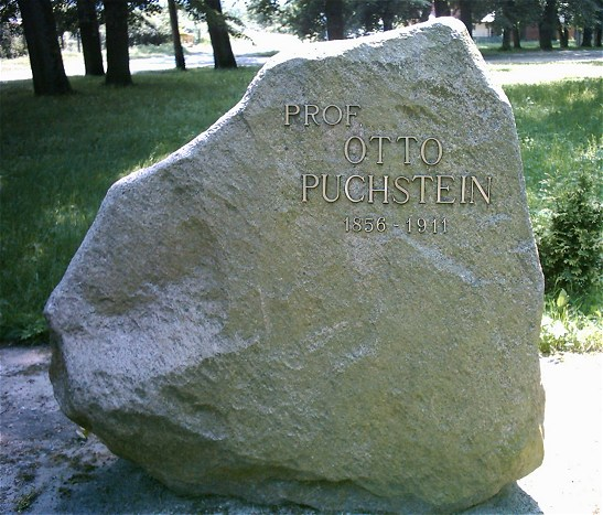 Otto Puchstein - Gedenkstein in Łobez Inschrift: PROF. OTTO PUCHSTEIN 1856–1911